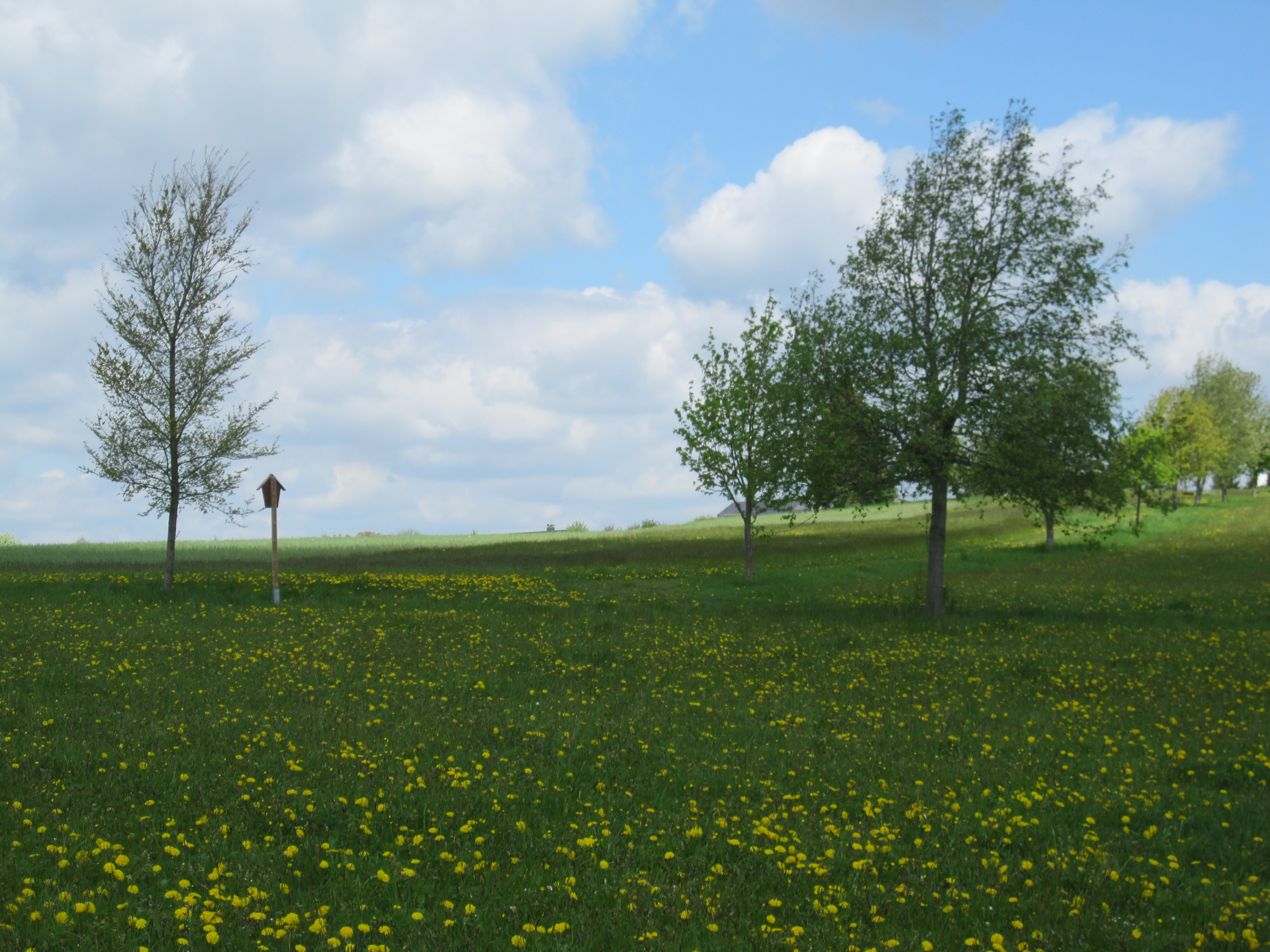 Das Naturschutzgebiet Moore südlich von Schönheide entstand 2013 durch eine Verordnung des Erzgebirgskreises. Oberer Rand des Naturschutzgebietes (links Schild!) ein Stück unterhalb des Baumannsberges (725,5 Meter), der ein Stück östlich des Wasserturms liegt.